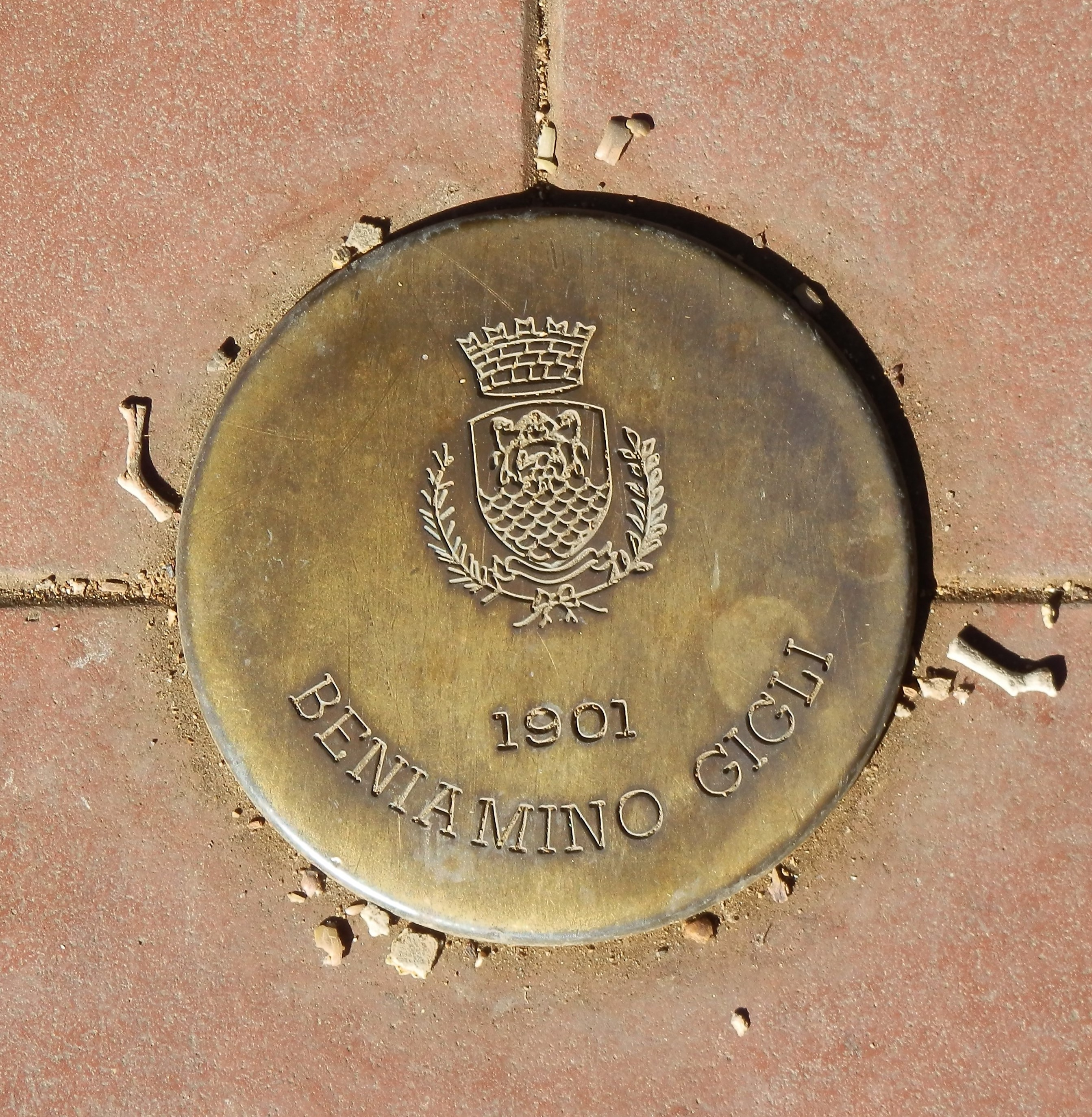 Walks of Fame di Montecatini Terme, immagini prese spostandosi dalle Terme Tettuccio verso la parte nord di Viale Verdi. This is a photo of a monument which is part of cultural heritage of Italy.